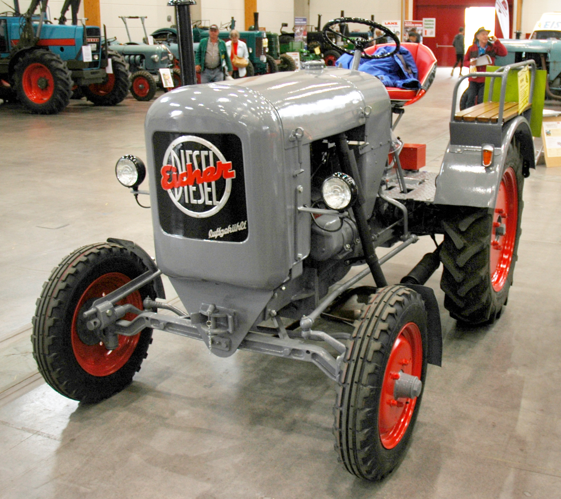 Sinsheim Agri Historica 2015: Eicher ED 16 bj 1952